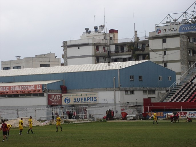 Pale de spor Panachaiki Greece